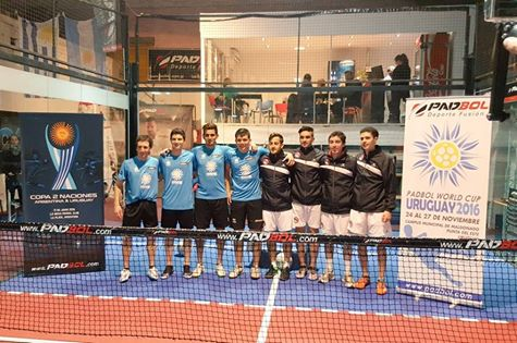 Copa 2 Naciones